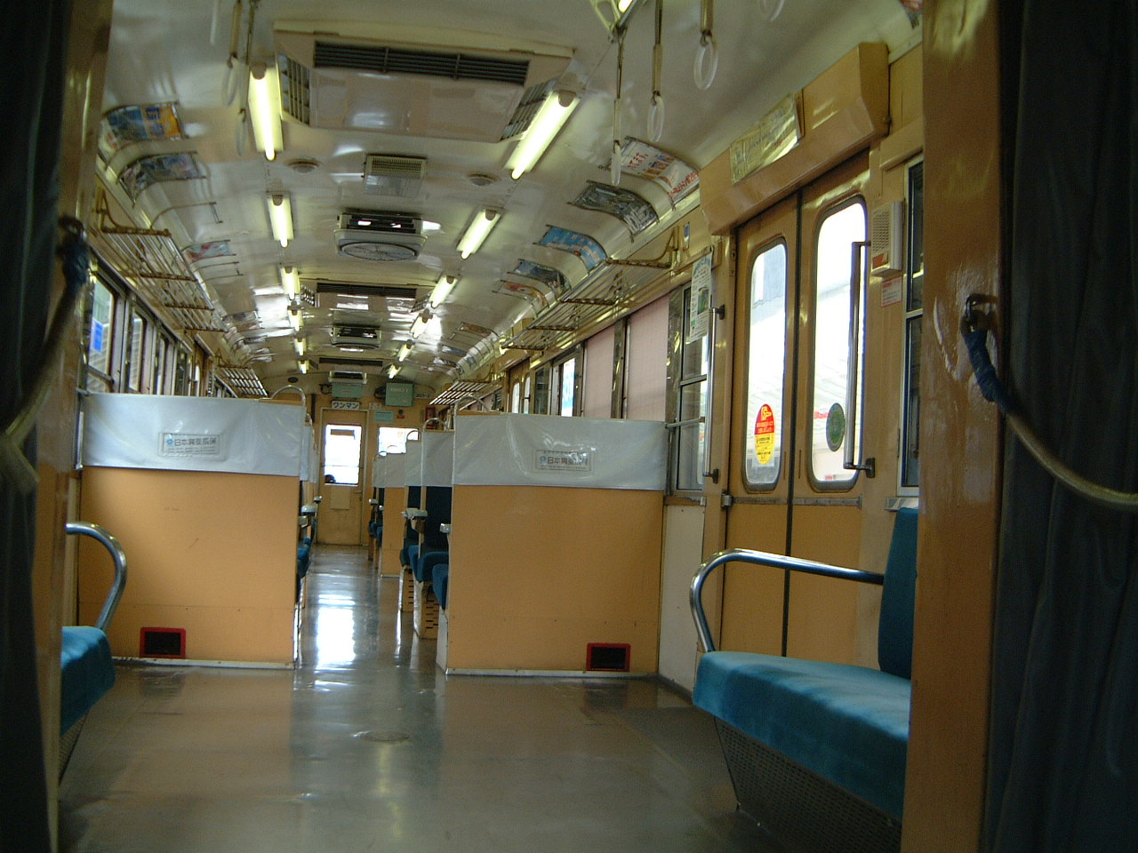 Fukui-tetsudo type300(Japan). （福井鉄道300形電車の車内画像（303号）。クロスシートを中心に座席が配置されており、各車両後部はロングシートとなっている）